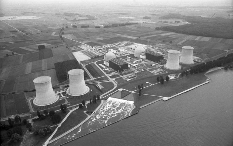 Rhein-Bodensee-Bereisung des Rates von Sachverständigen für Umweltfragen und des Bundesministeriums des Inneren.